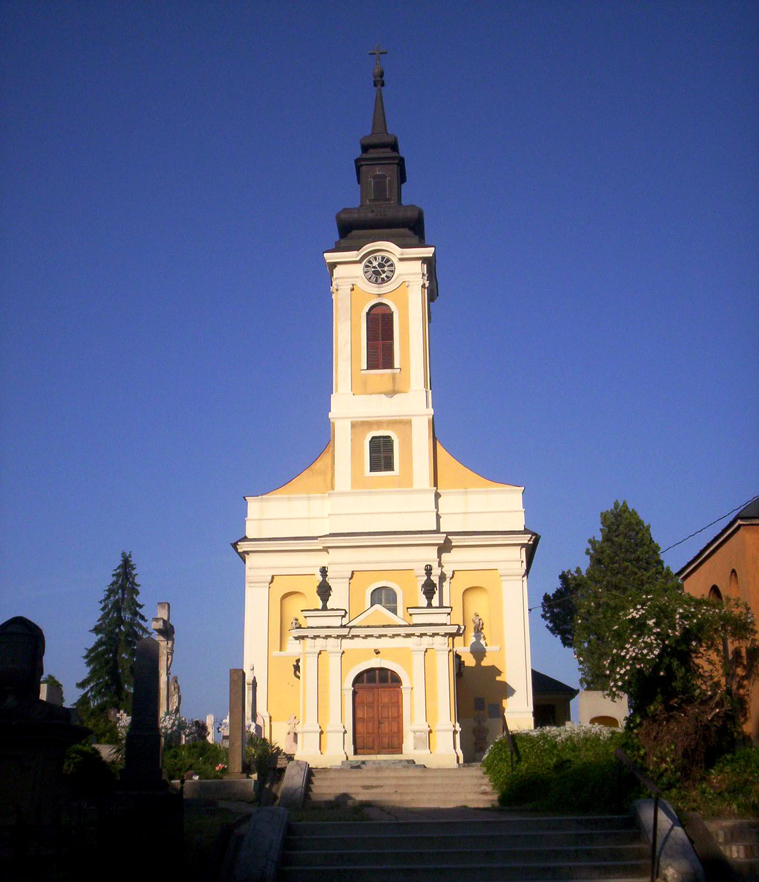 Szent Rókus-kápolna, Baja. A késő barokk stílusú kápolna 1770-ben épült. 1991. március 15-e óta a kápolna őrzi Mészáros Lázár honvéd altábornagy, hadügyminiszter sírját. – photo taken by uploader User:Csanády in 2006.